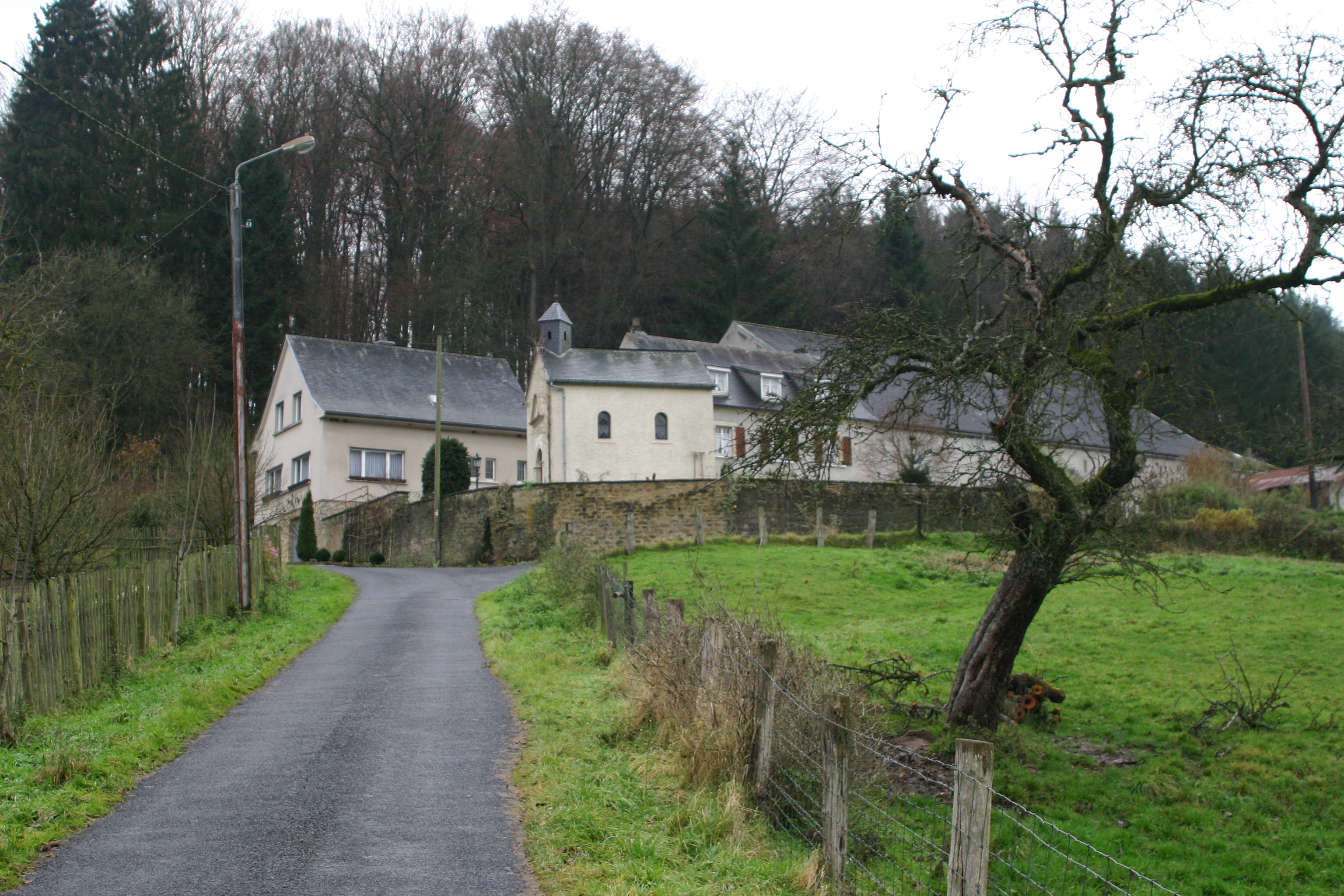 De Jeanharishaff